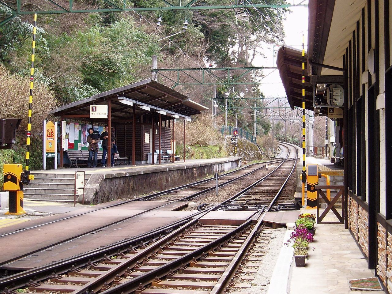 Miyanoshita Station, on the Hakone Tozan Line, Hakone, Kanagawa 宮ノ下駅